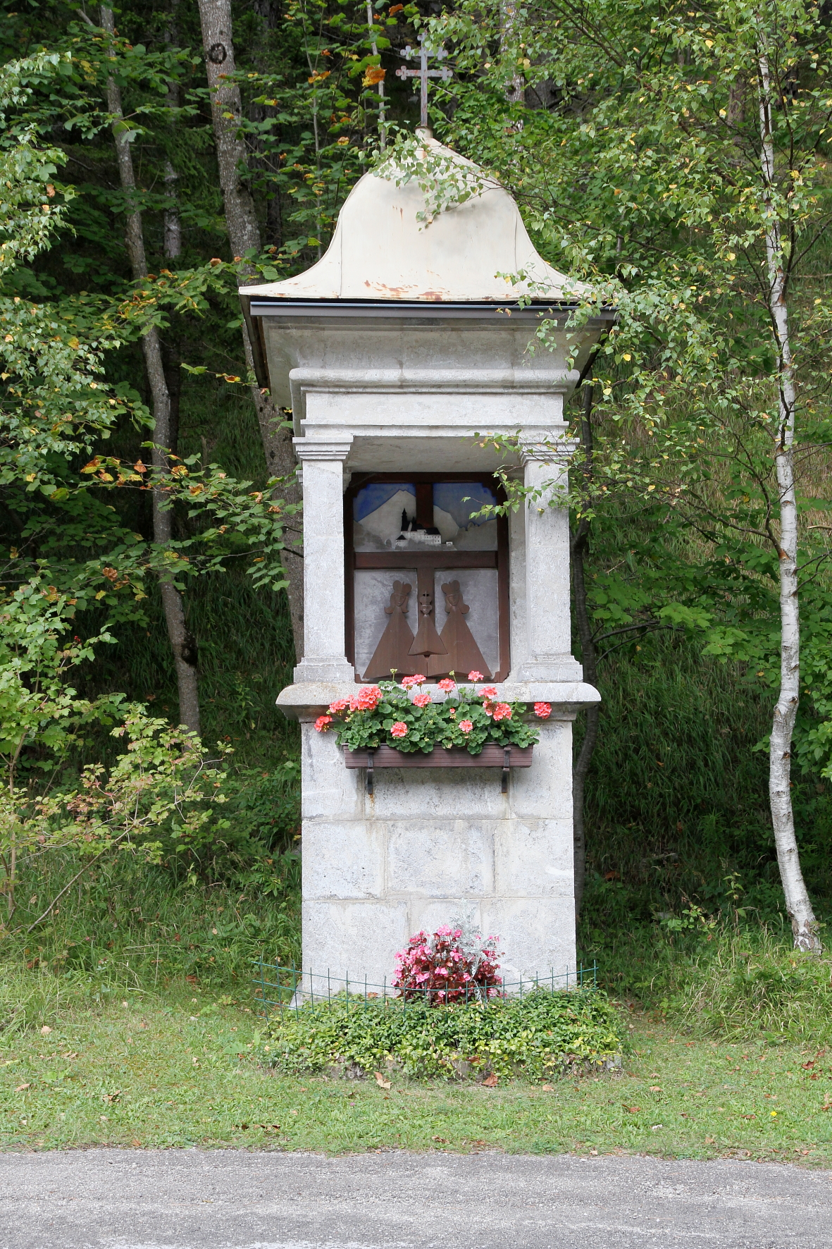 Das sogenannte Urlauberkreuz in der niederösterreichischen Gemeinde Annaberg.